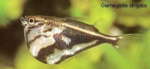 bijlzalm (Garnegiella strigata)